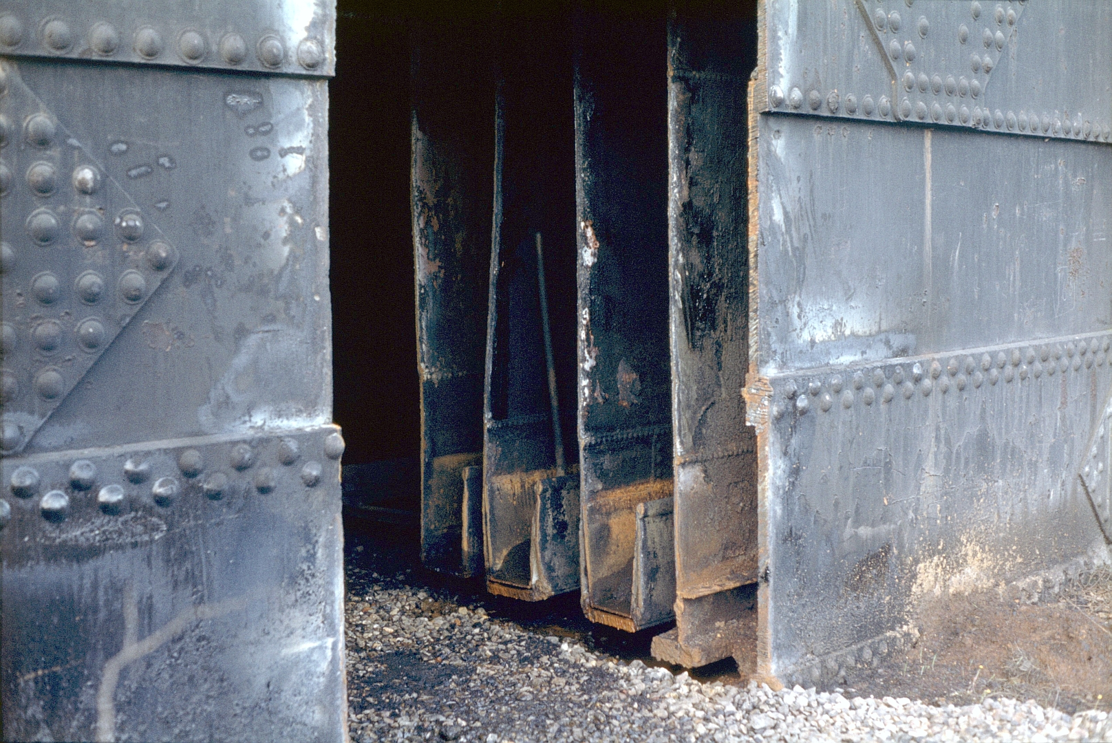 Ouverture découpée dans la cuve du gazomètre N°9 et permettant d'observer la base des 4 levées avec leurs gorges d'accrochages (14/03/1981).